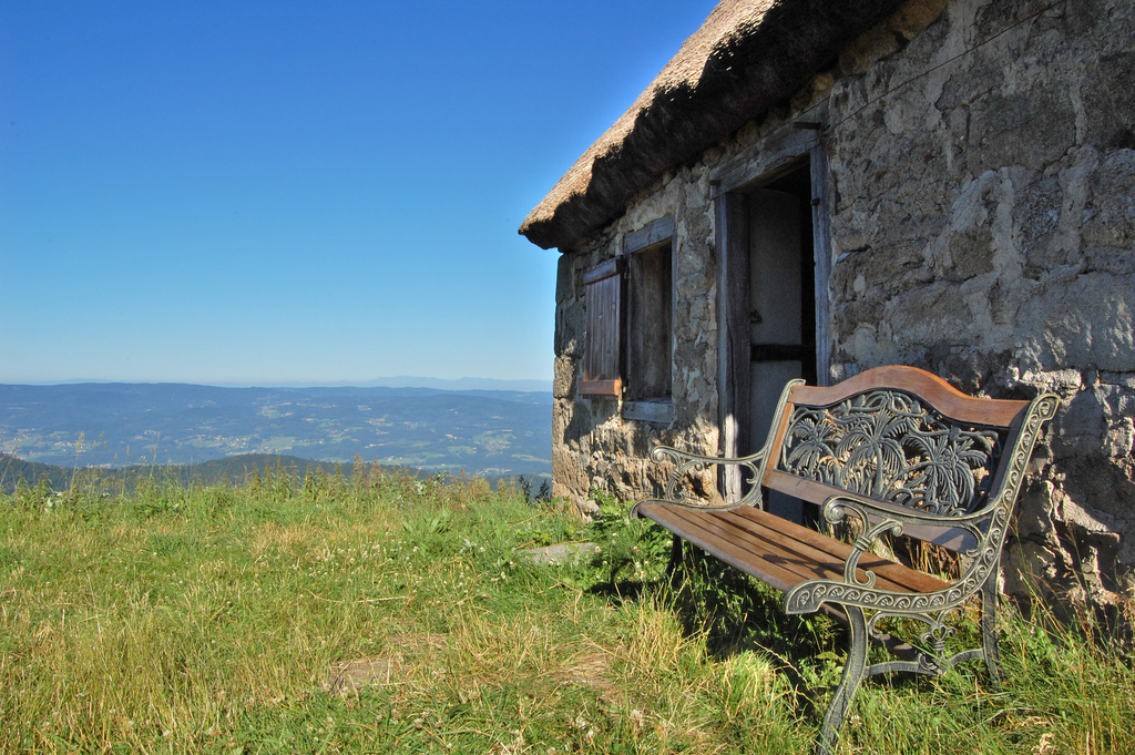 Jasserie dans les Monts Du Forez